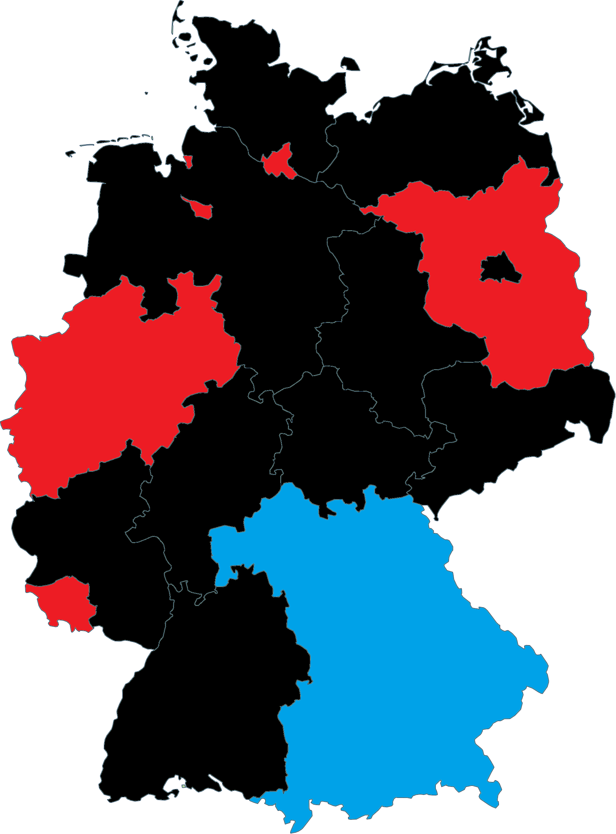 Elections européennes de 1994 en Allemagne, parti arrivé en tête par Land. Rouge : SPD Noir : CDU Bleu : CSU